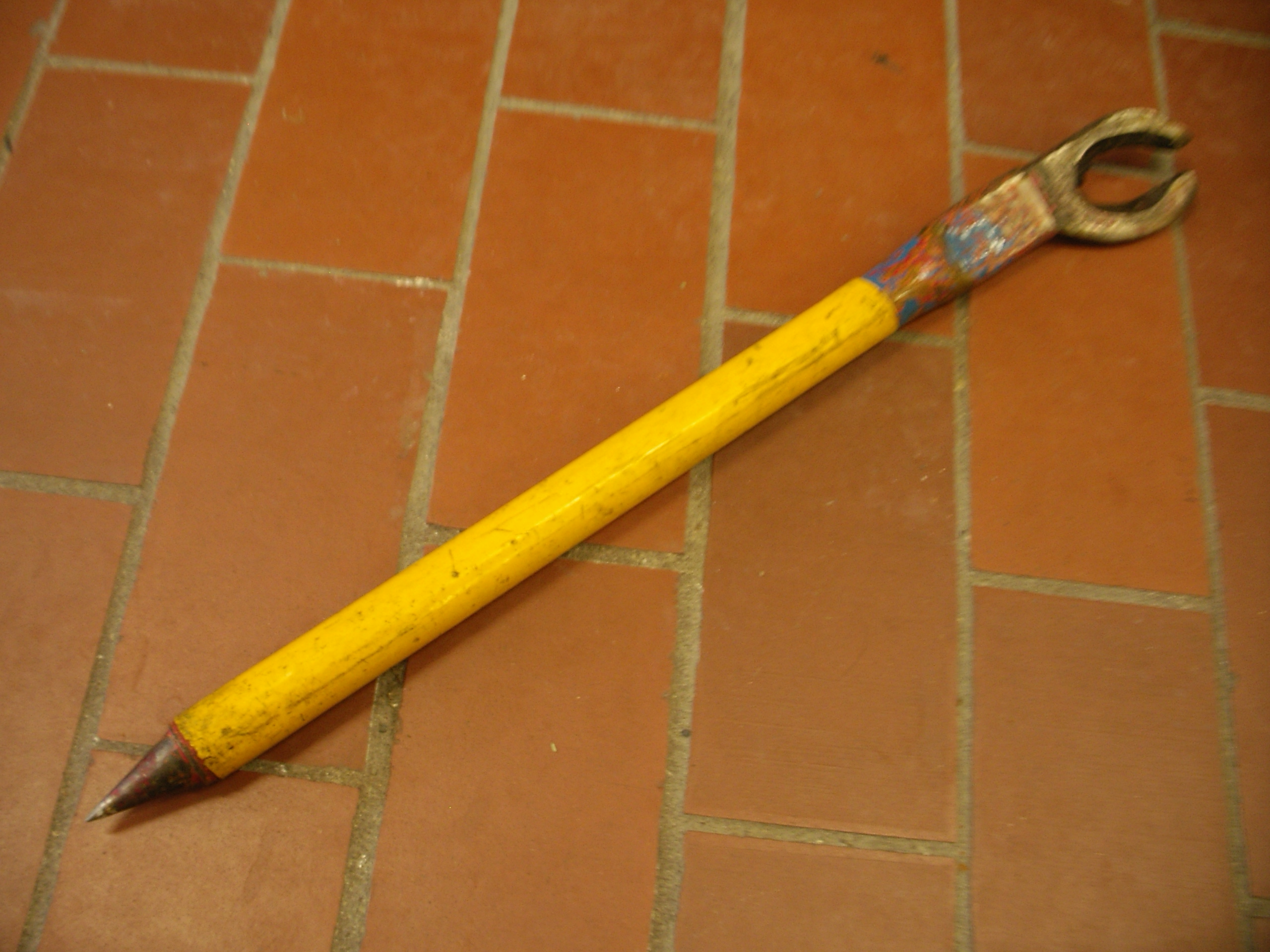 blechaufreisser der Feuerwehr